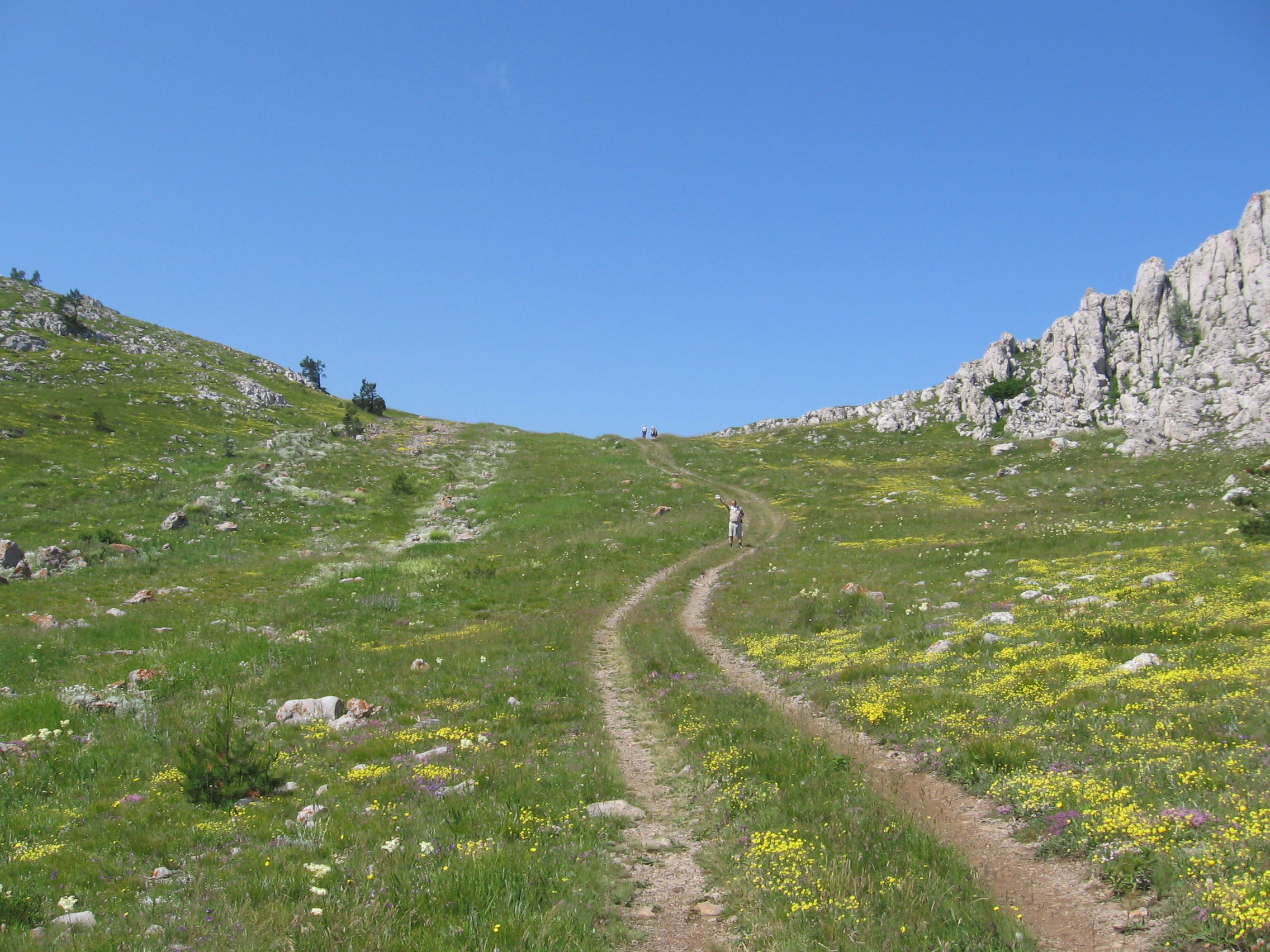 Фото